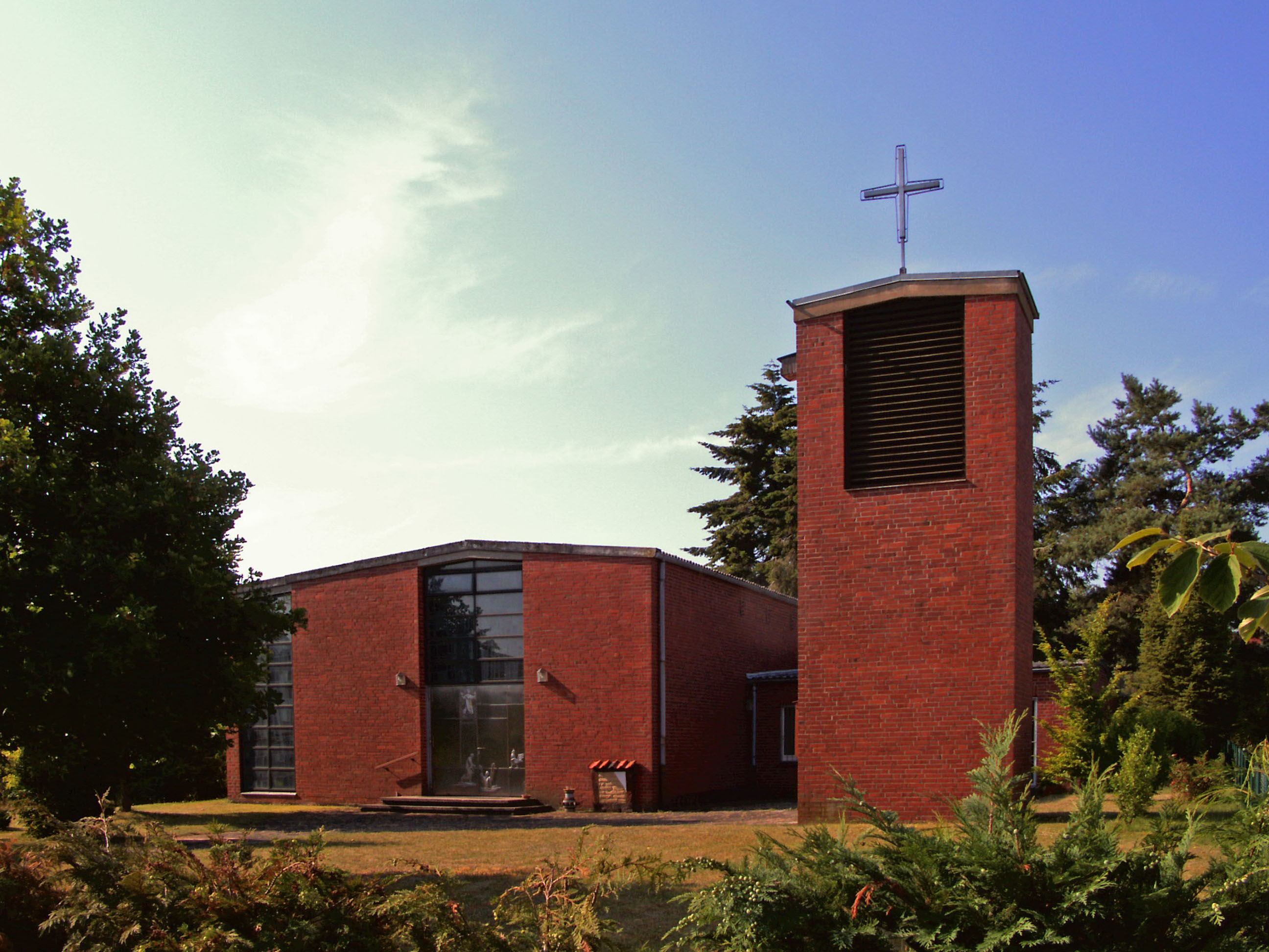 Heimatmuseum in Eltze (Region Hannover), in ehemaliger katholischer Kirche St. Petrus.